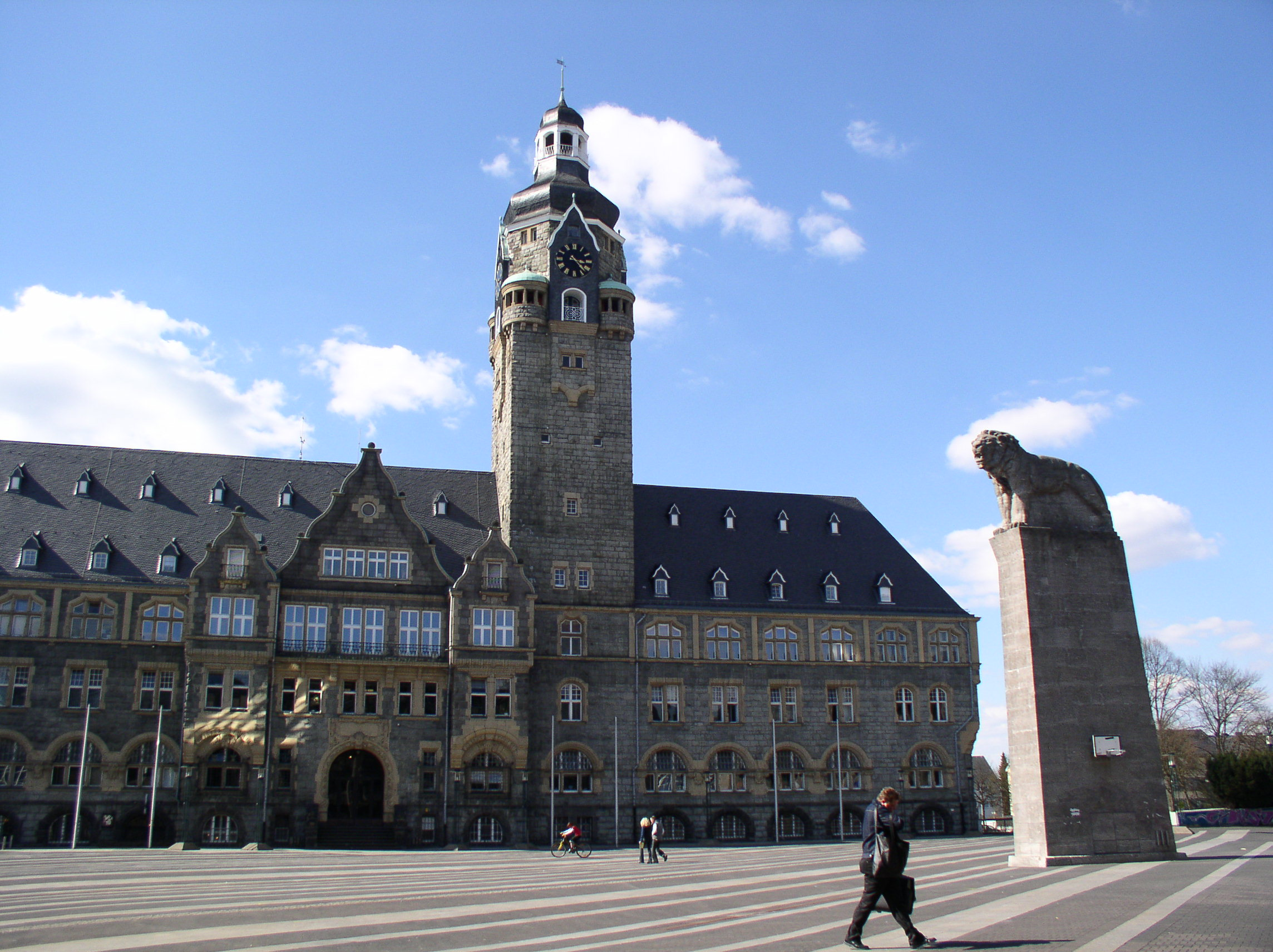 Remscheid